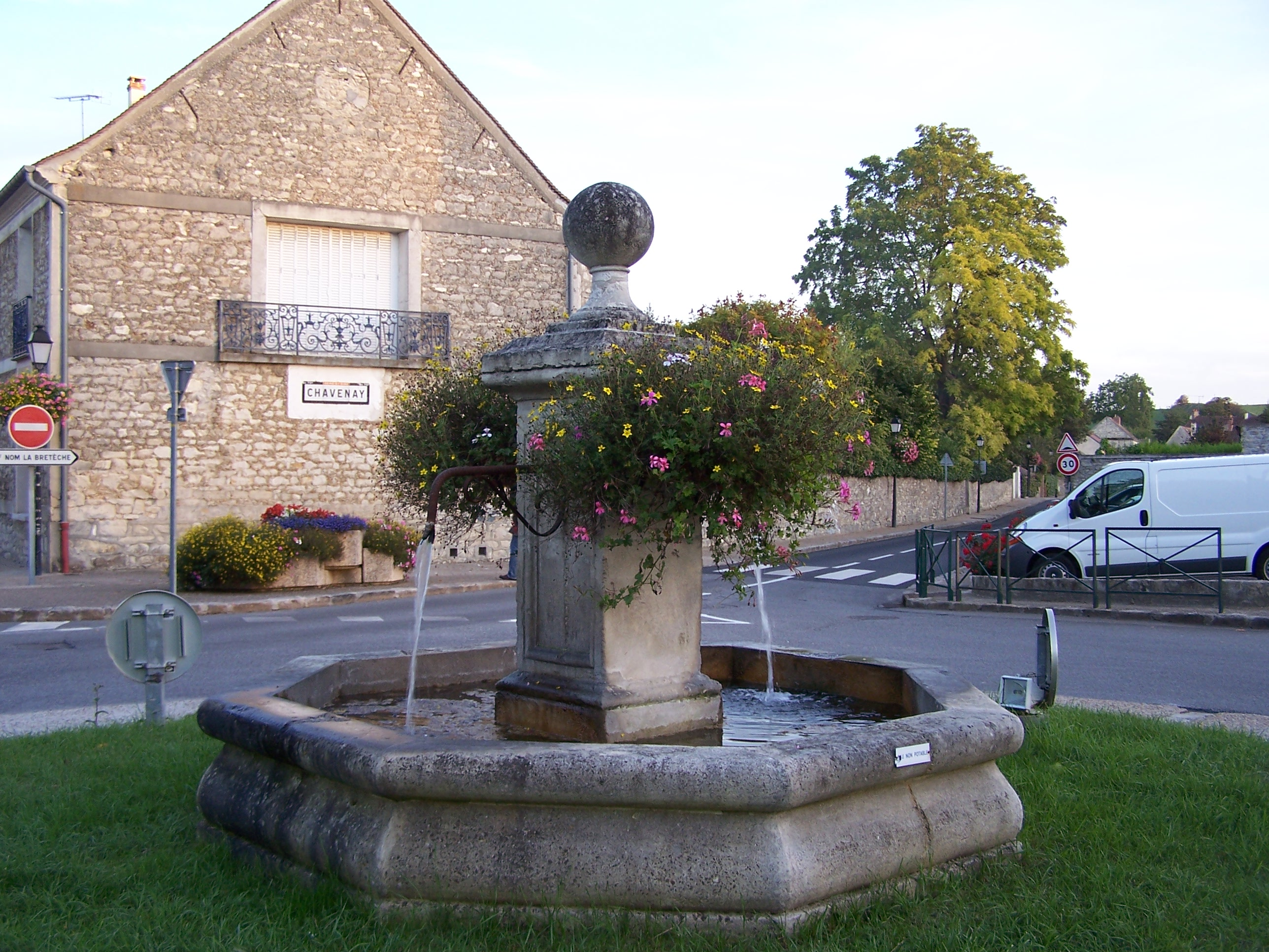 Place de Rösrath à Chavenay (Yvelines, France)